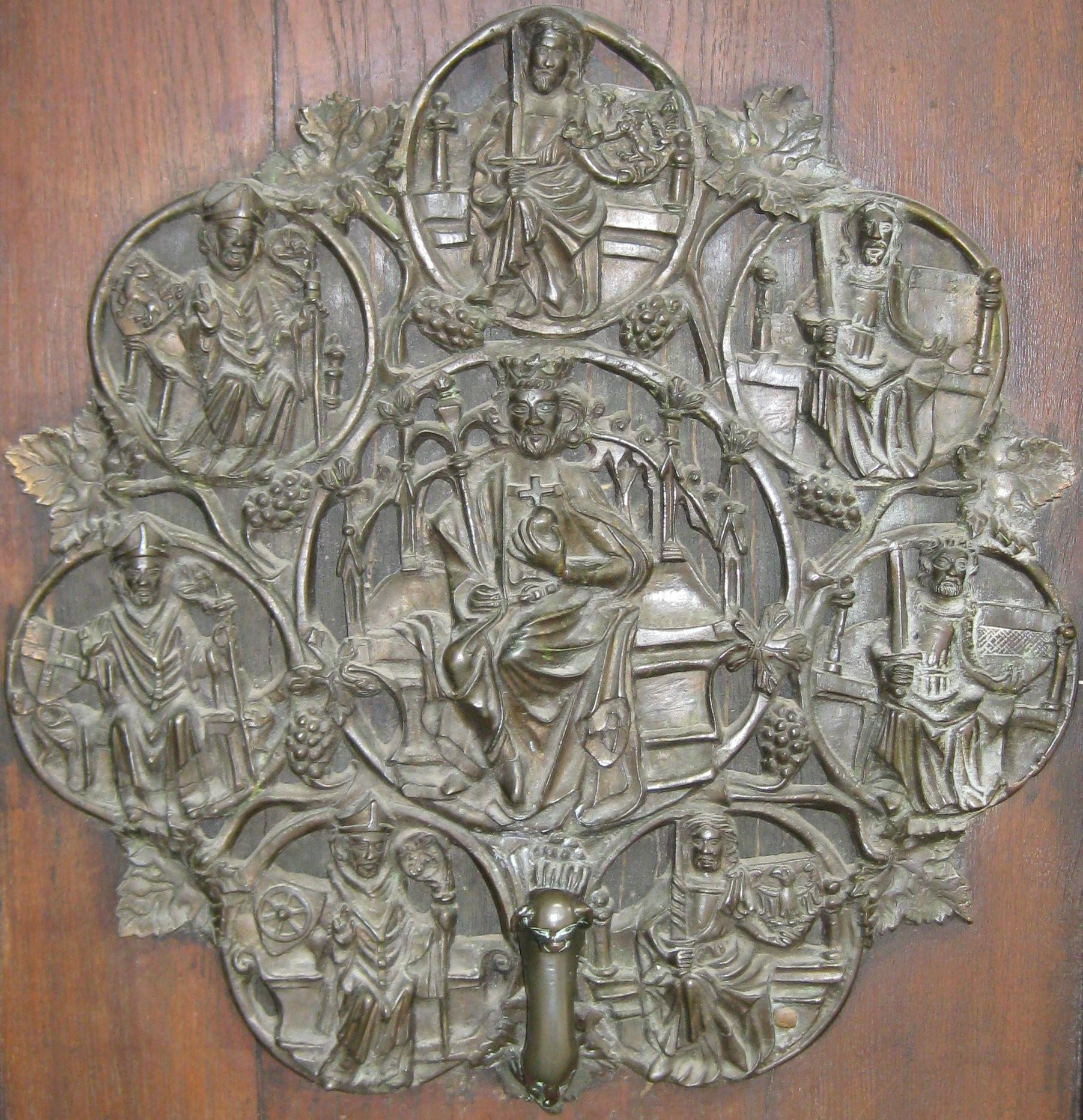 Gotischer Türklopfer am Hauptportal des Lübecker Rathauses.